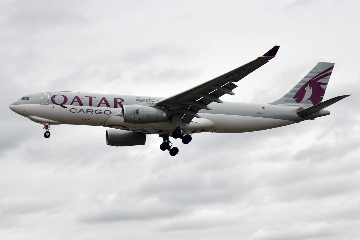 Qatar Cargo, A7-AFF, Airbus A330-243F